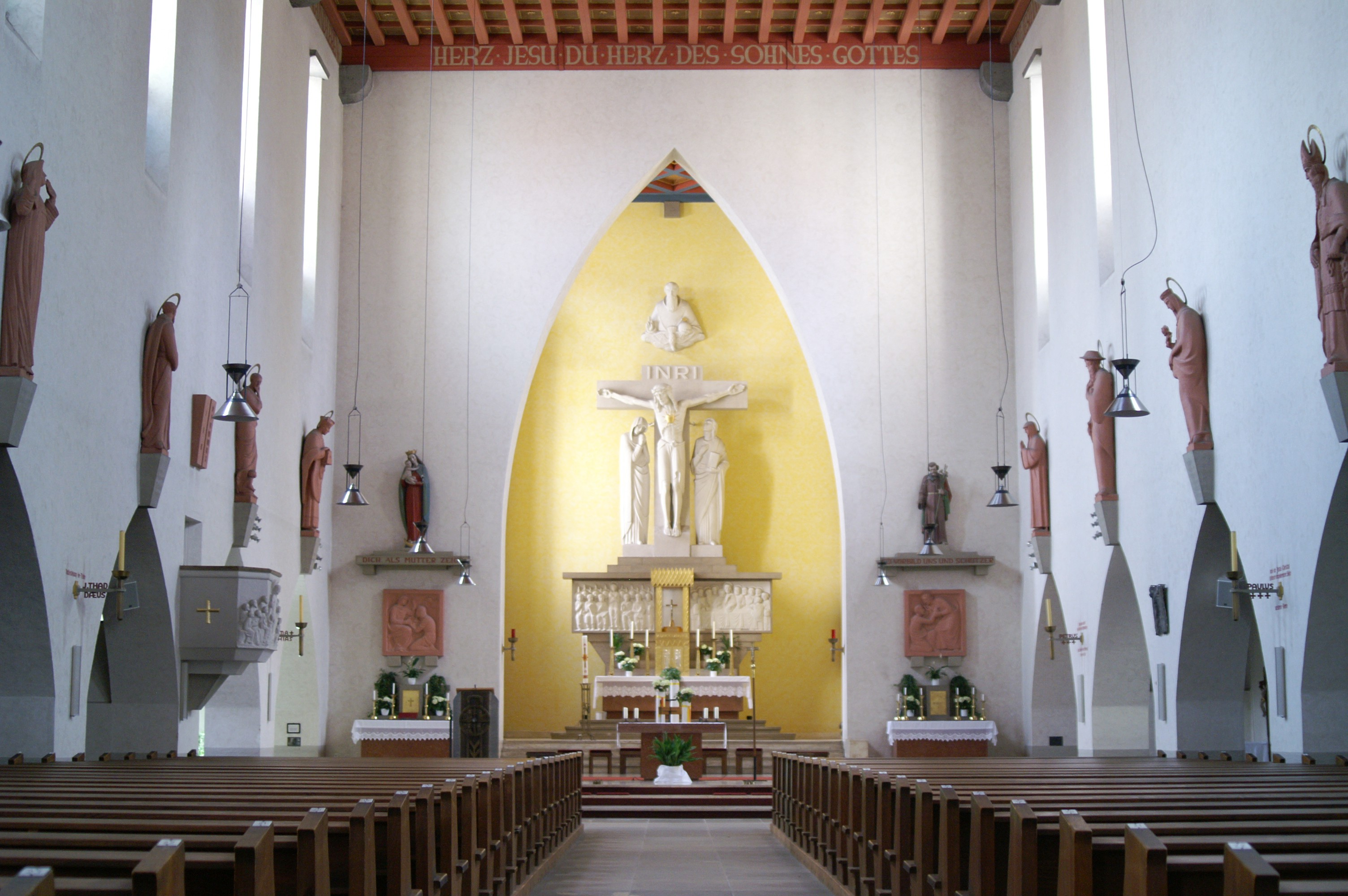 Innenansicht der Herz-Jesu-Kirche in Regensburg